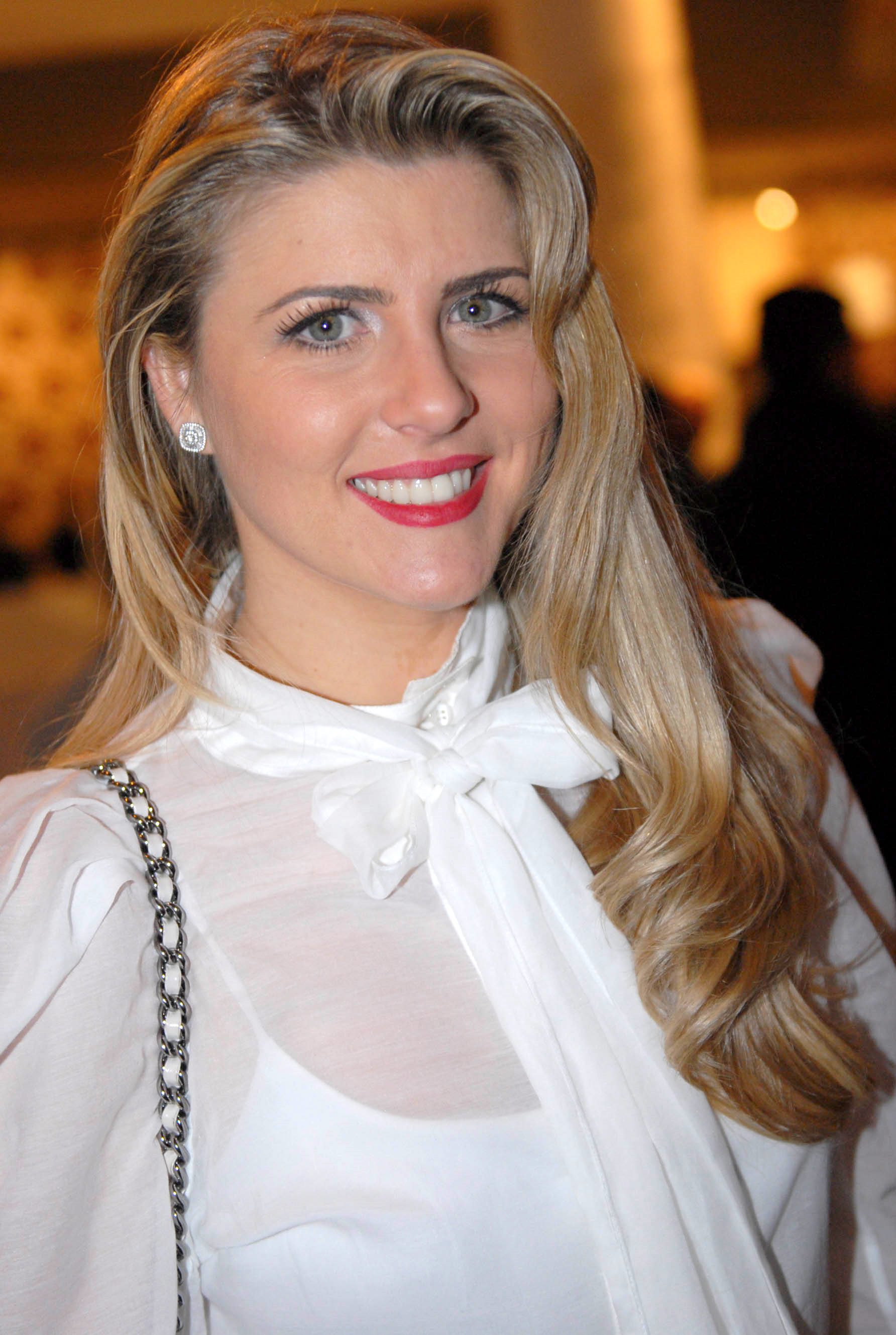 Íris Stefanelli no SPFW em junho de 2011